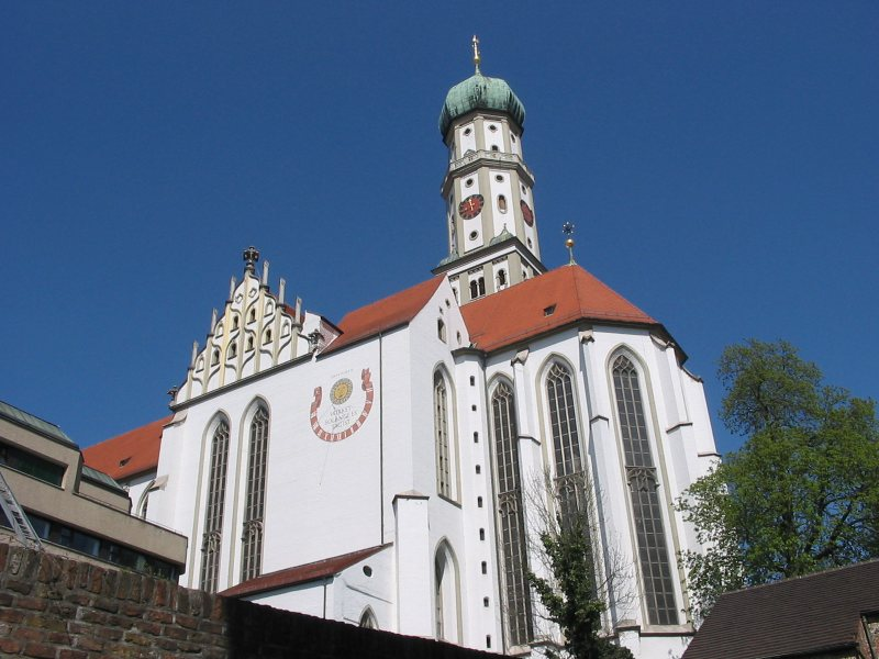 Basilika St. Ulrich und Afra in Augsburg. Südseite mit Sonnenuhr. April 2005.